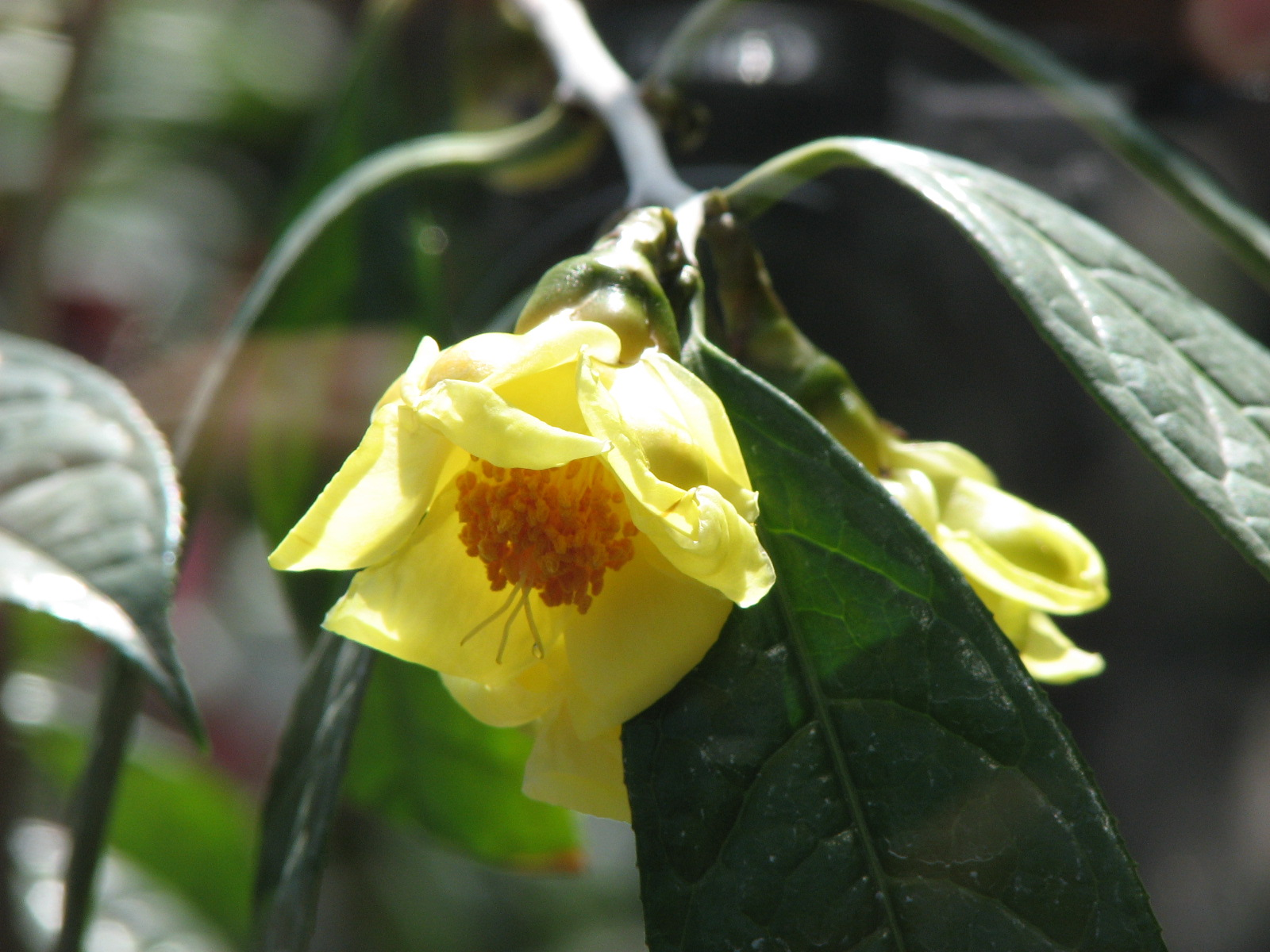 Camellia chrysantha (金花茶): 栽培品・東京都立大島公園・日本